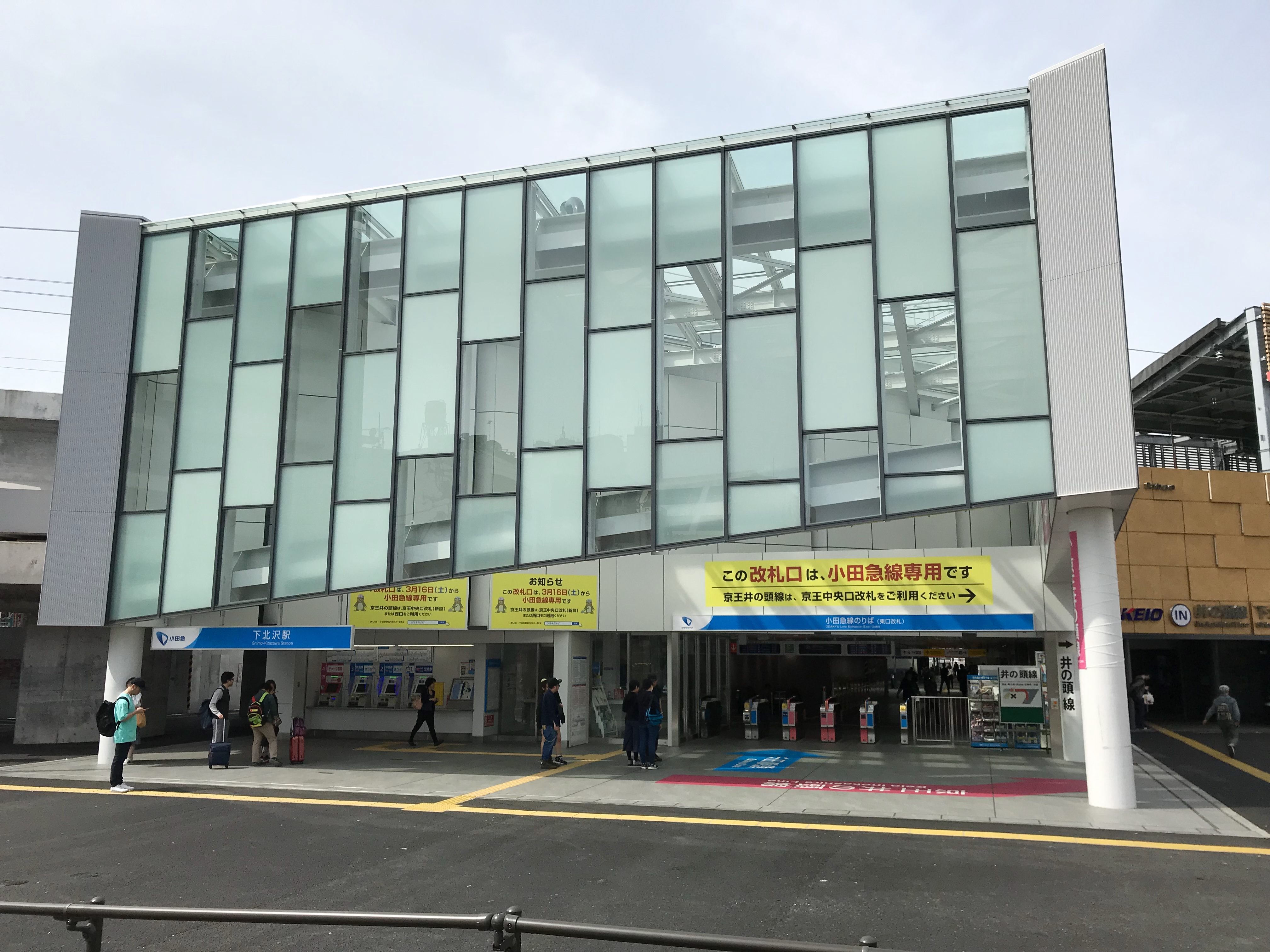 小田急小田原線下北沢駅駅舎